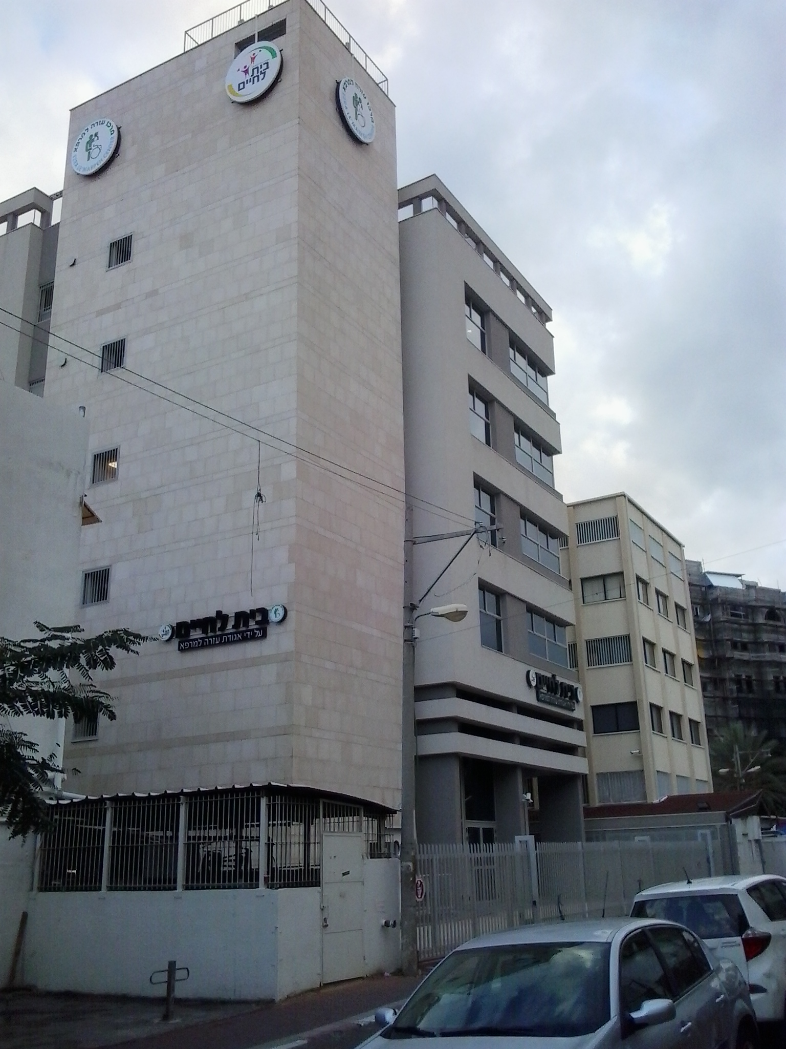 עזרה למרפא